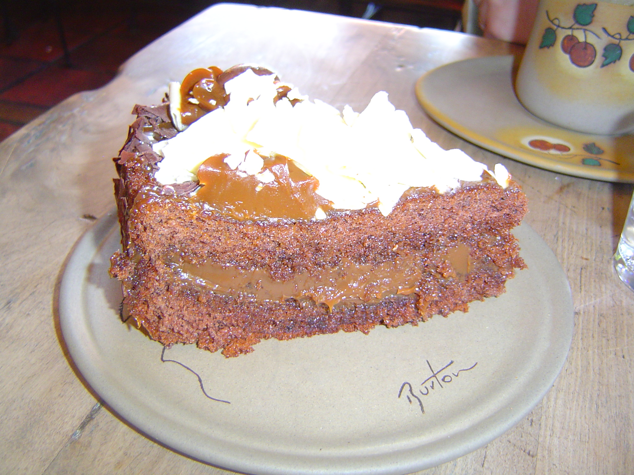 Torta de Chocolate y Dulce de leche